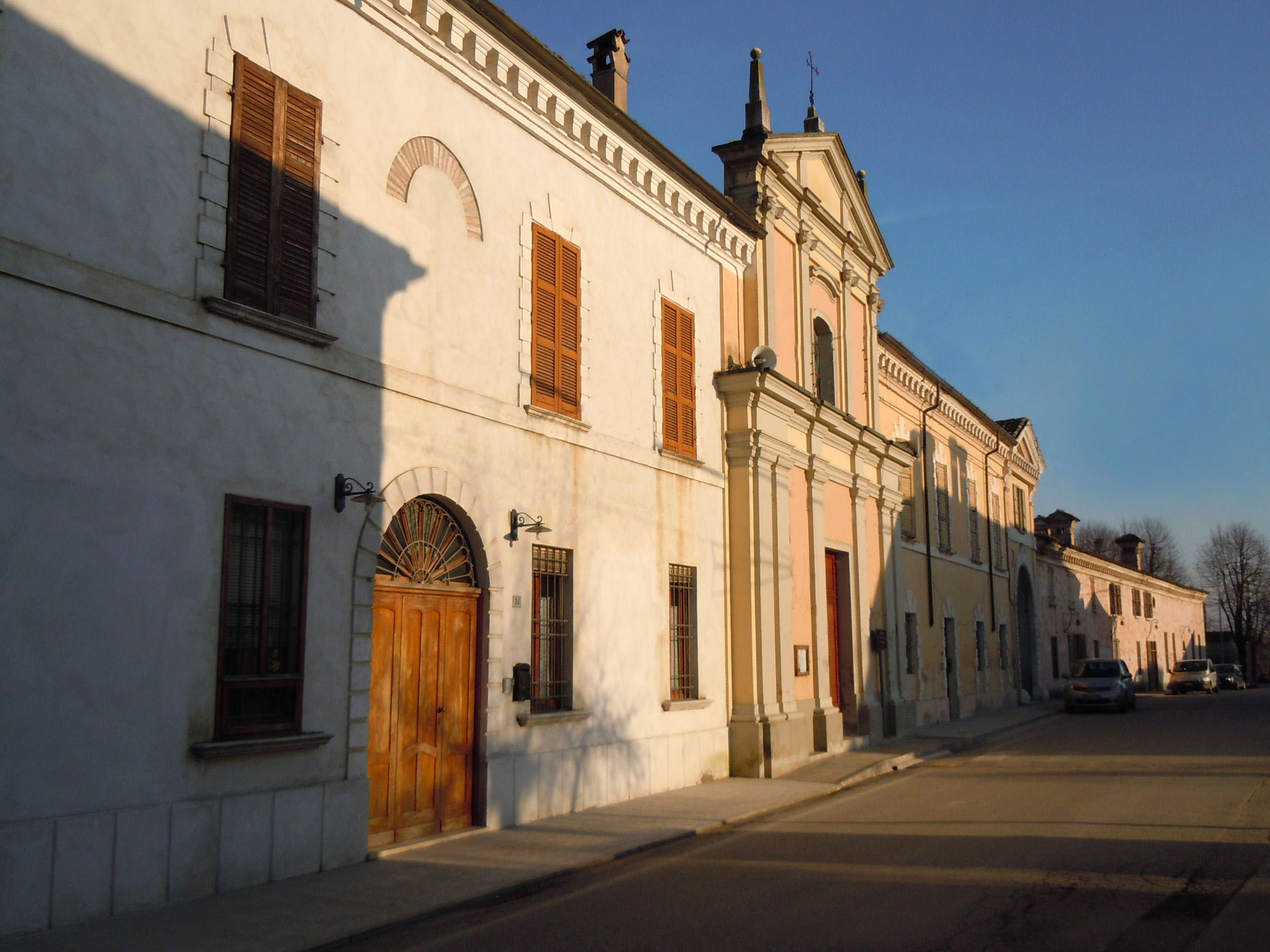 Sorbara di Asola, panorama.